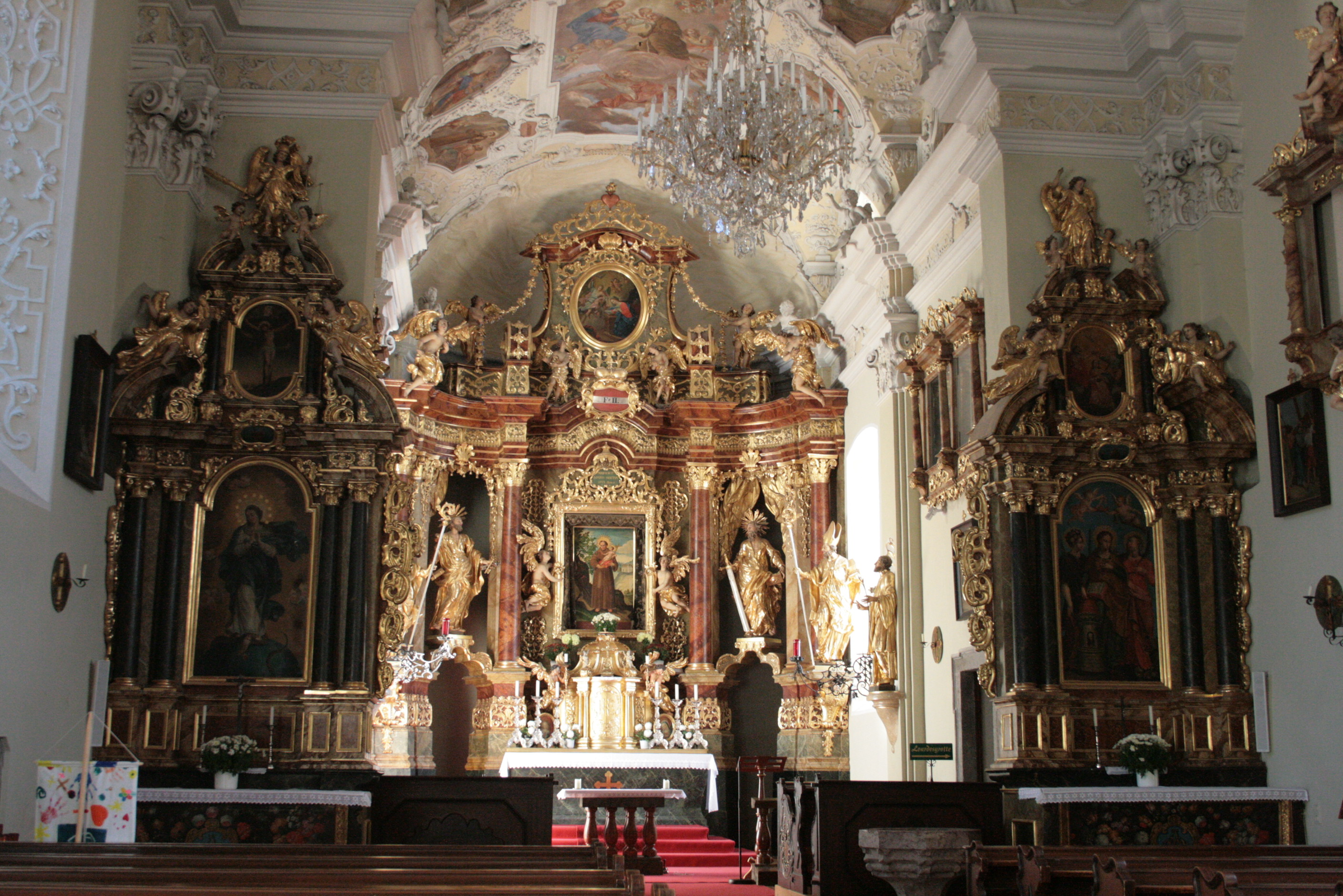 Kirchhofanlage hl. Antonius von Padua und Friedhof